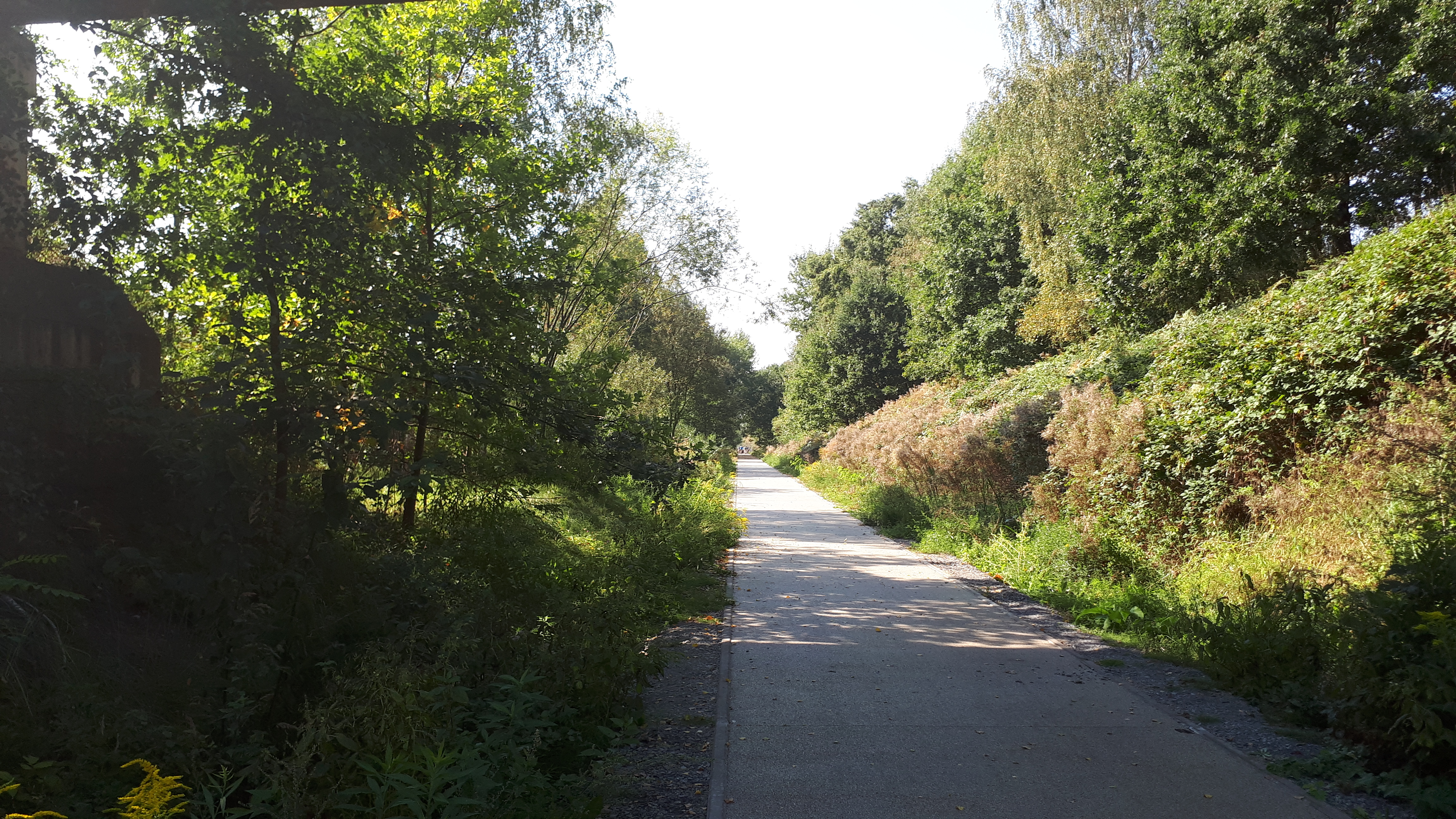 Železná cyklotrasa / Żelazny Szlak Rowerowy / Iron Bike Trail